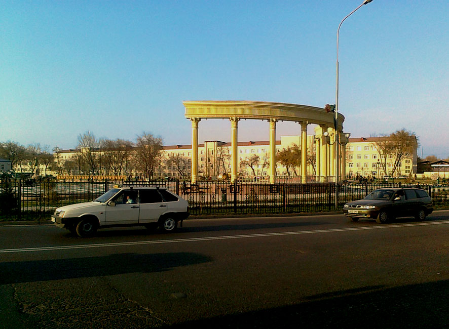 Аркада у сквера на месте бывшего базара (г Шымкент).